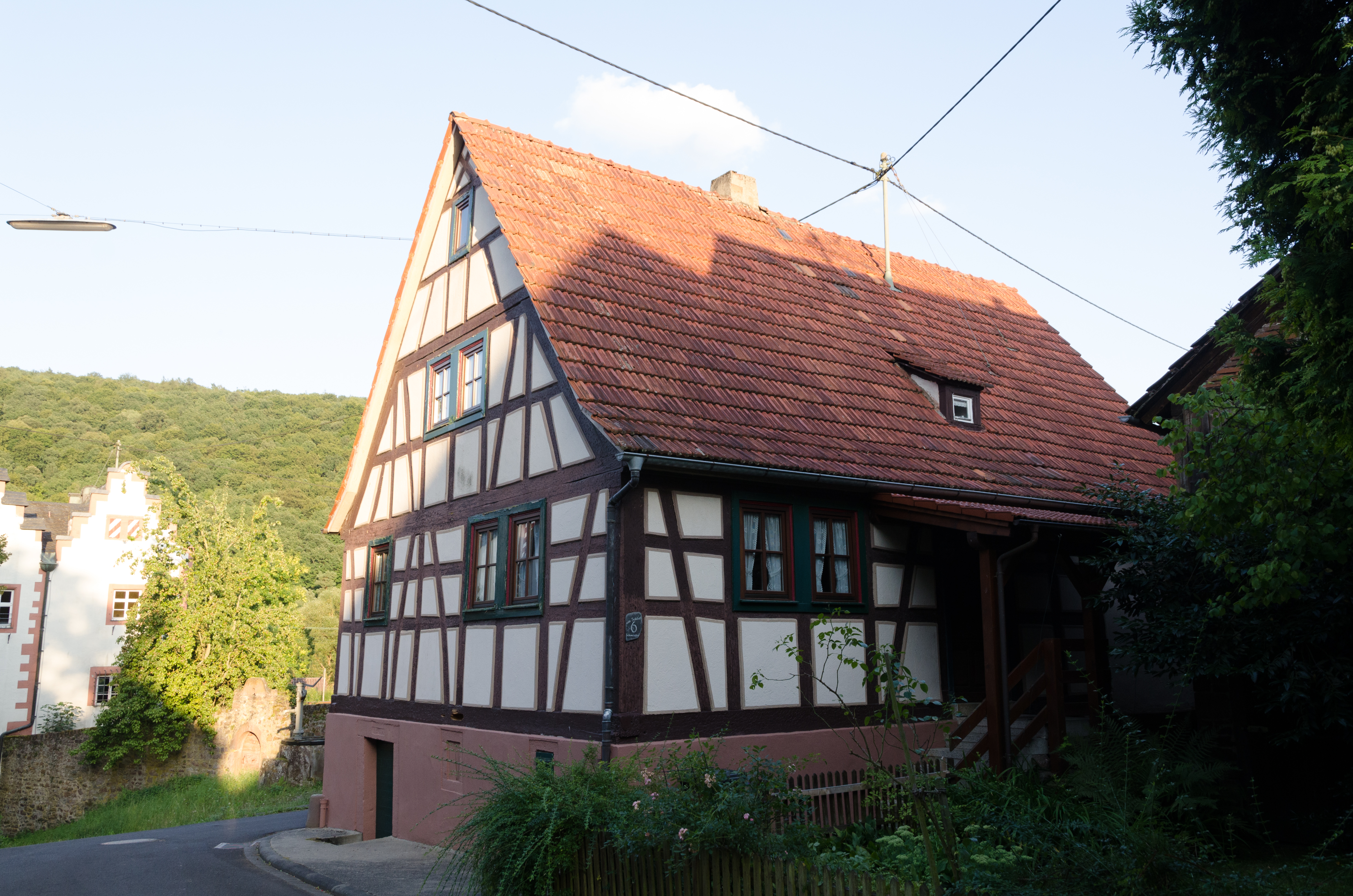 Wolfsmünster, Am Schloß 6